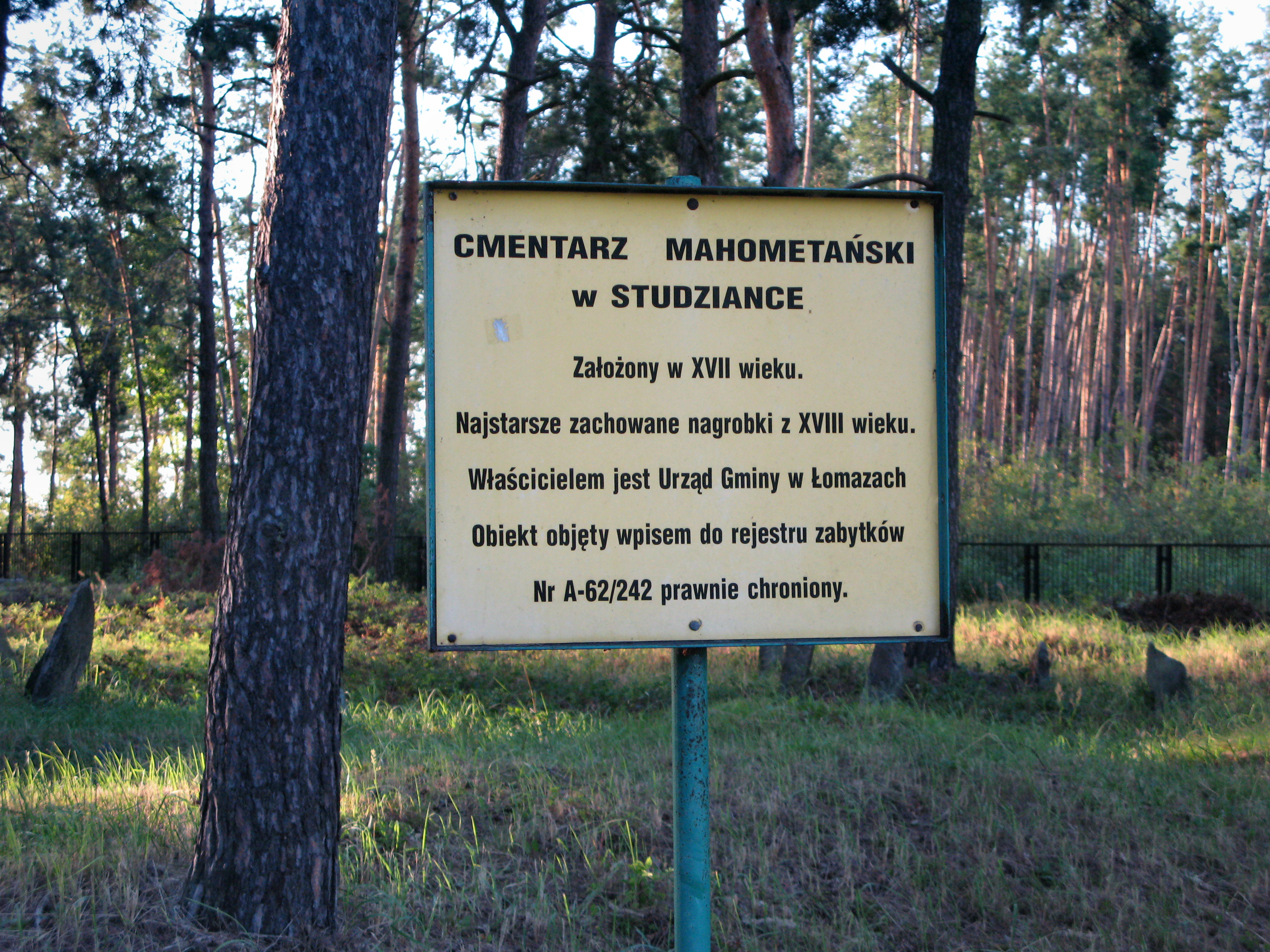 Studzianka – cmentarz mahometański (zabytek nr rejestr. A/242 z 3.09.1953 i z 28.02.1967)